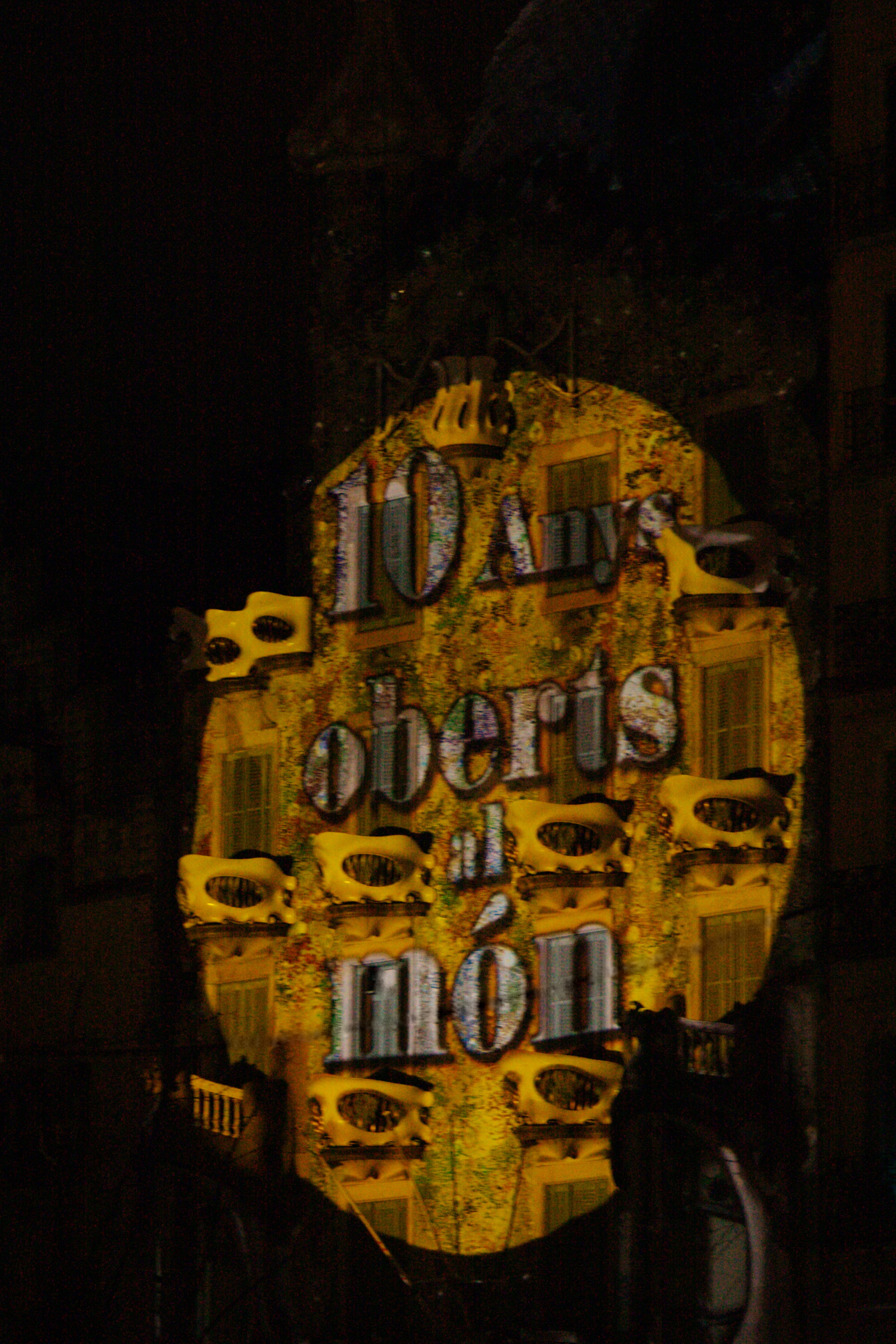 Projecció en vídeo mapping en commemoració dels 10 anys de l'obertura al públic de la casa Batlló.